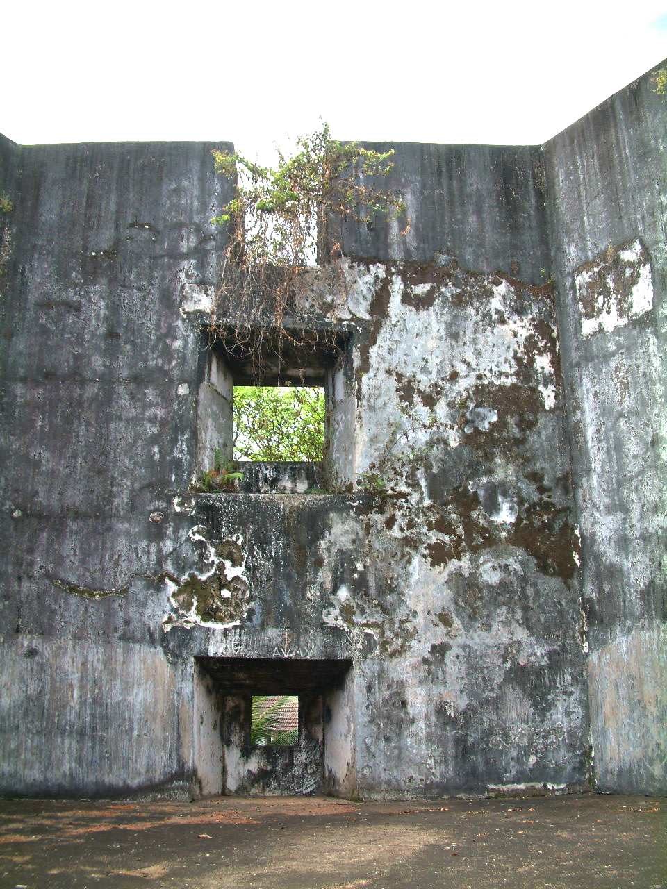 പള്ളിപ്പുറം കോട്ട ( അയീക്കോട്ട)